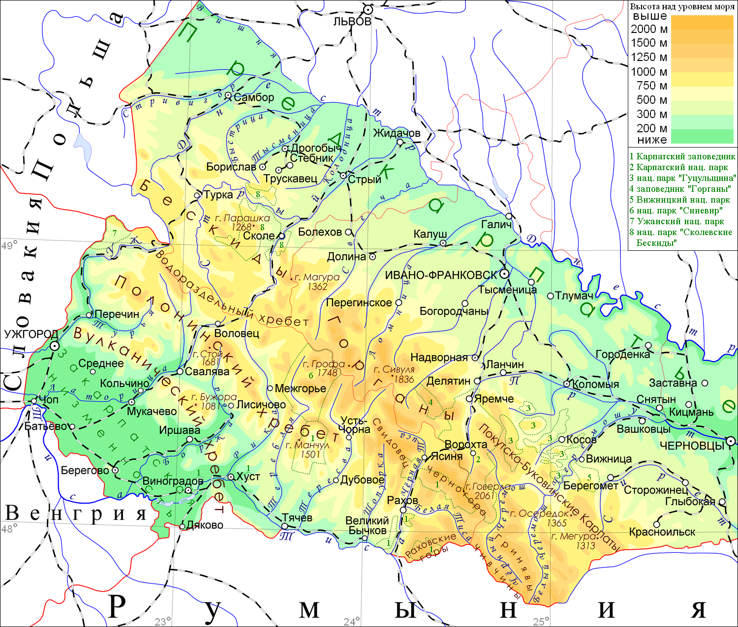 Физическая карта Украинских Карпат